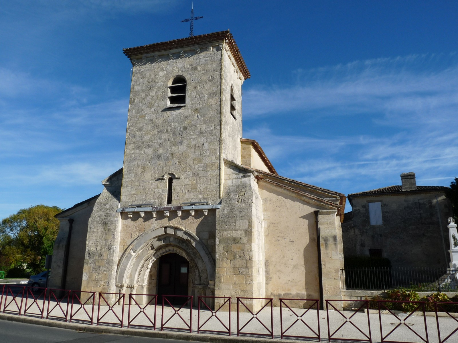 Eglise de Saint-Martin-Lacaussade, Gironde, France